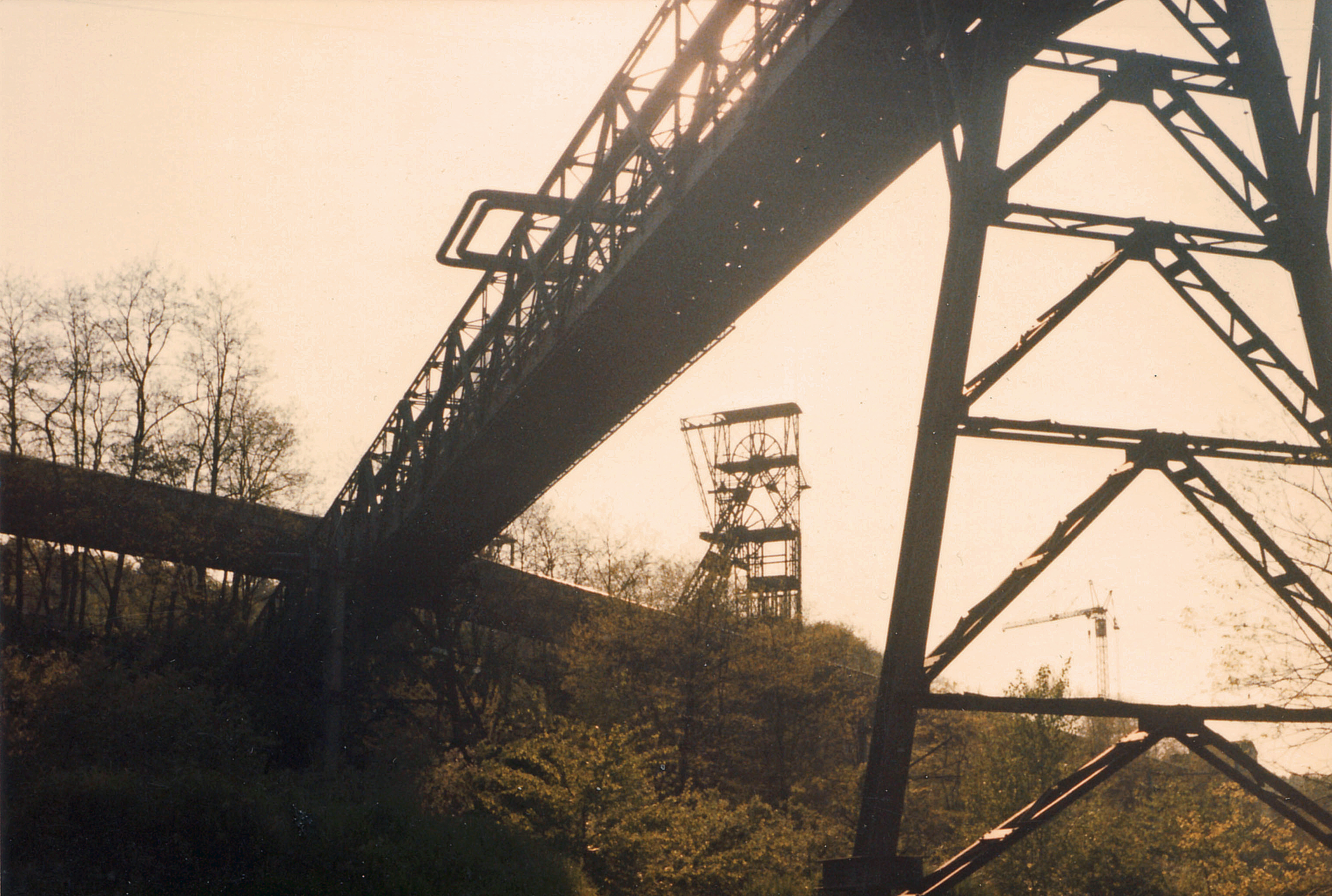 Ancien puits de Cuvelette en 1973 avant sa démolition et sa passerelle. Ville de Freyming-Merlebach.